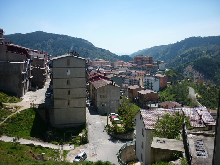 San Giovanni in Fiore - urbanizzazione anni '70 e '80